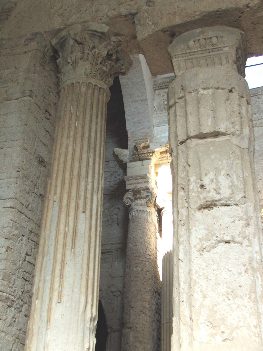 Basilica di San Salvatore (Spoleto) Ldoc